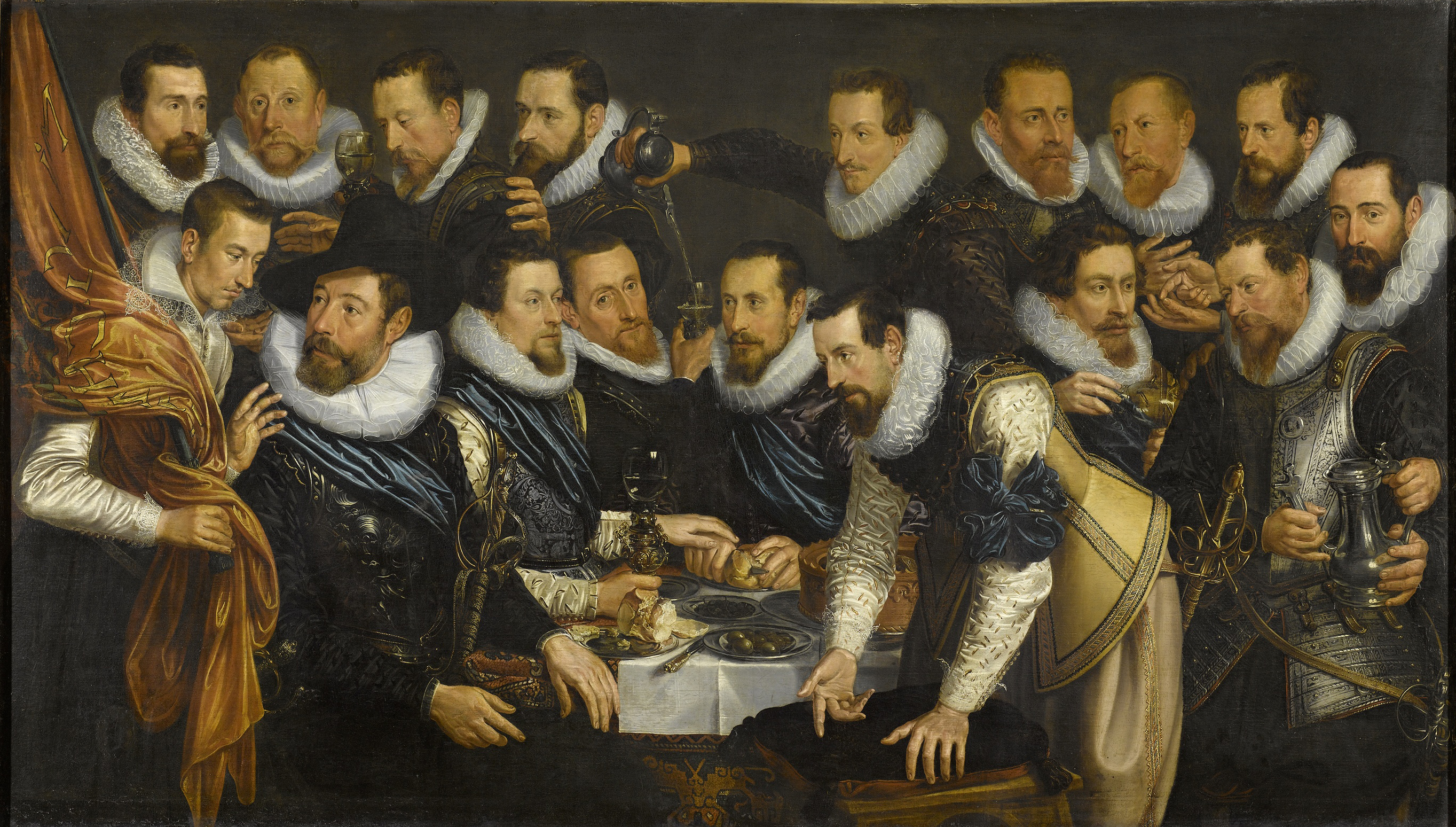 Schuttersstuk met de maaltijd van de zeventien schutters van de Handboogdoelen onder leiding van kapitein Geurt Dircksz van Beuningen en luitenant Pieter Martensz Hoeffijser, Amsterdam, 1613. In het midden tussen de schutters is een gedekte tafel zichtbaar waarop enkele borden met etenswaren (brood, pastei, olijven) staan en een roemer in een bekerschroef. Sommige van de schutters hebben een glas of een wijnkan in de hand. Voorgesteld zijn van links naar rechts (bovenste rij): Hans van der Voort, Jan Cornelisz Meulen, Gerrit Martsz Conijnenburgh, Willem Kik, Heindrik Hogendorp, Cornelis Gerritsz, Laurens Laurensz van Baalen, Cosmo de Moucheron en Pierre de Nimay; (onderste rij): vaandrig Klaas Bisschop, kapitein Geurt Dircksz van Beuningen, luitenant Pieter Martensz Hoeffijser , Laurens Jansz van Lier, Heindrick Sybrantsz Voet, Adriaen van Nieulandt, sergeant Jan Tengnagel en Aert Keyser.